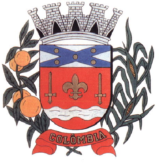 Brasão do município de Colômbia, estado de São Paulo, Brasil. Coat of Arms of the city of Colômbia, São Paulo state, Brazil. Based on Emerson